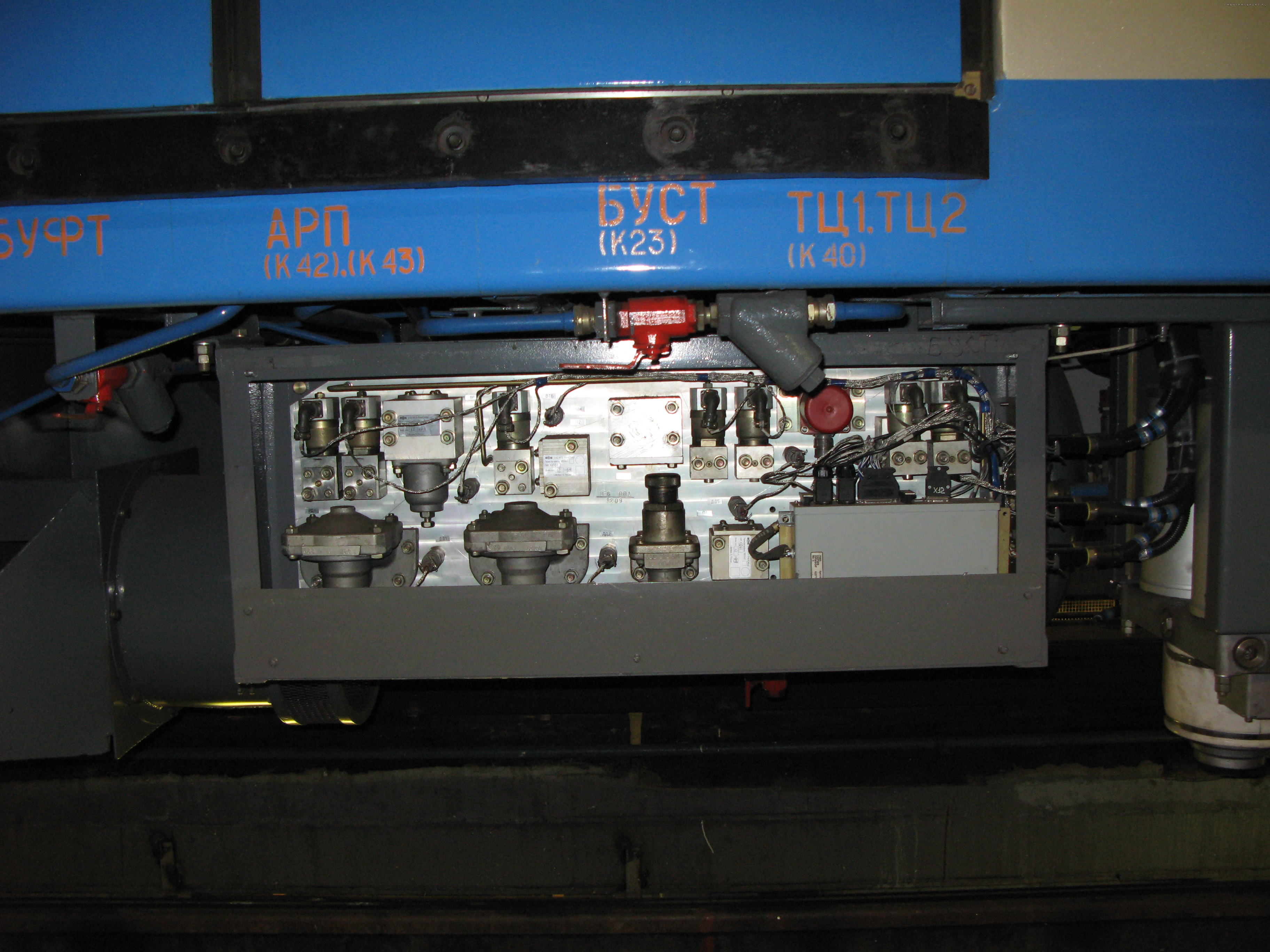 Блок управления фрикционным тормозом в подвагонном пространстве электропоезда метро 81-760-761